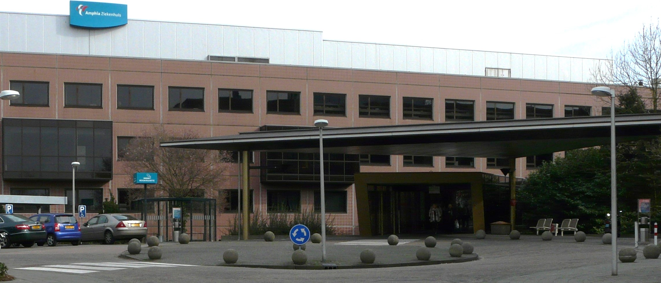 Amphia Ziekenhuis Langendijk in Boeimeer in Breda